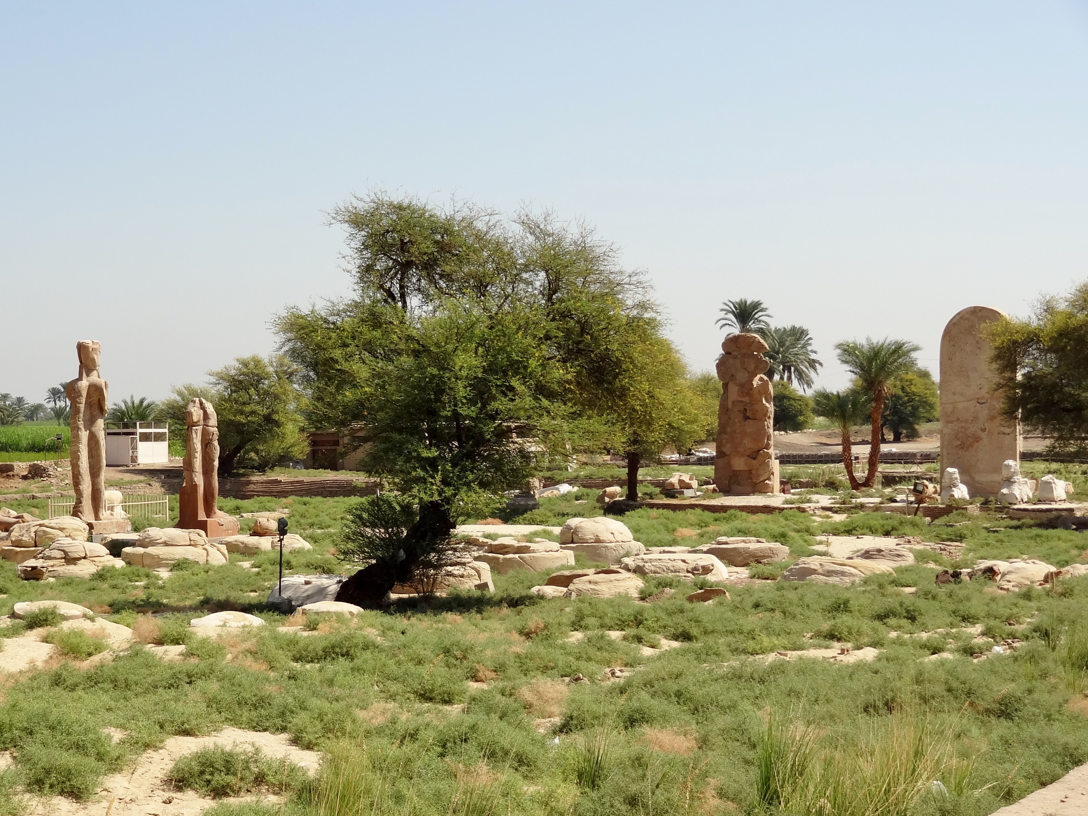 Ausgrabungsstätte von Kom el-Hettan, Theben-West, Ägypten